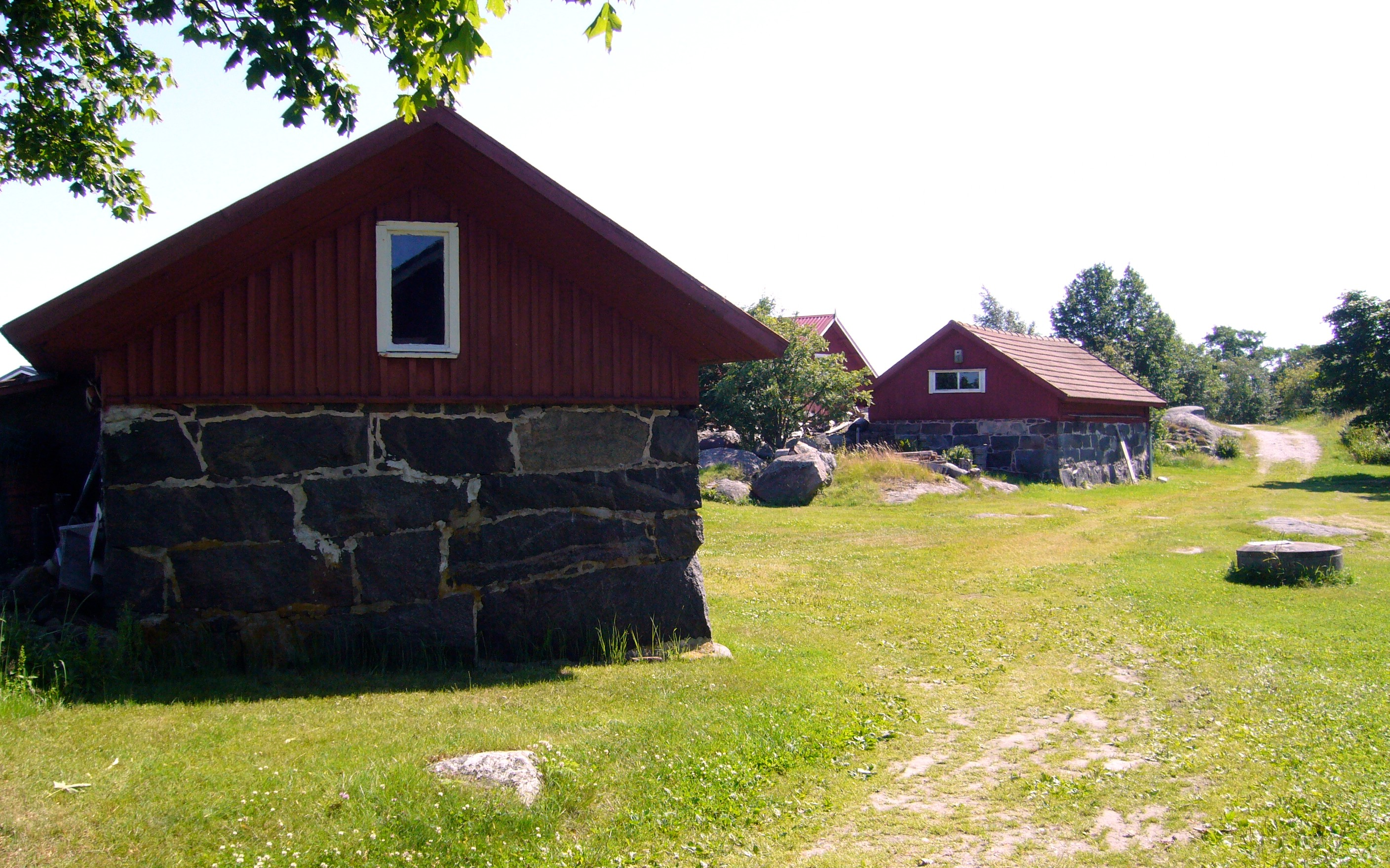 Stugor på Borstö i Nagu